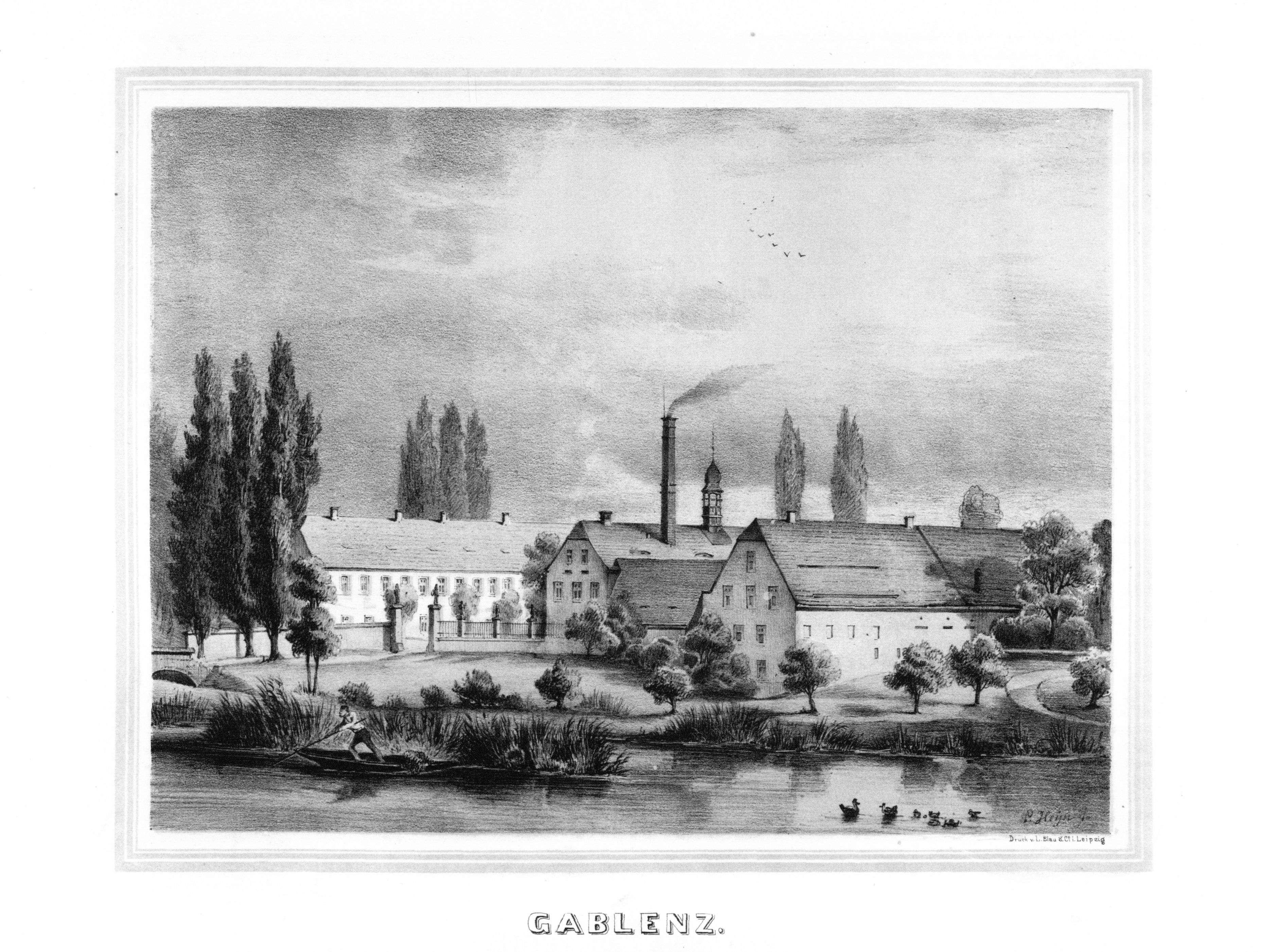 Gablenz aus: Album der Rittergüter und Schlösser im Königreiche Sachsen Erzgebirgischer Kreis Section: IV